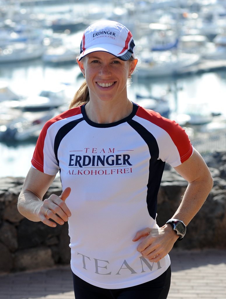 Sonja Tajsich, Training auf Lanzarote